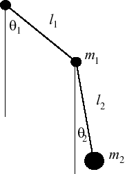 animation pendule double auteur r ferreol